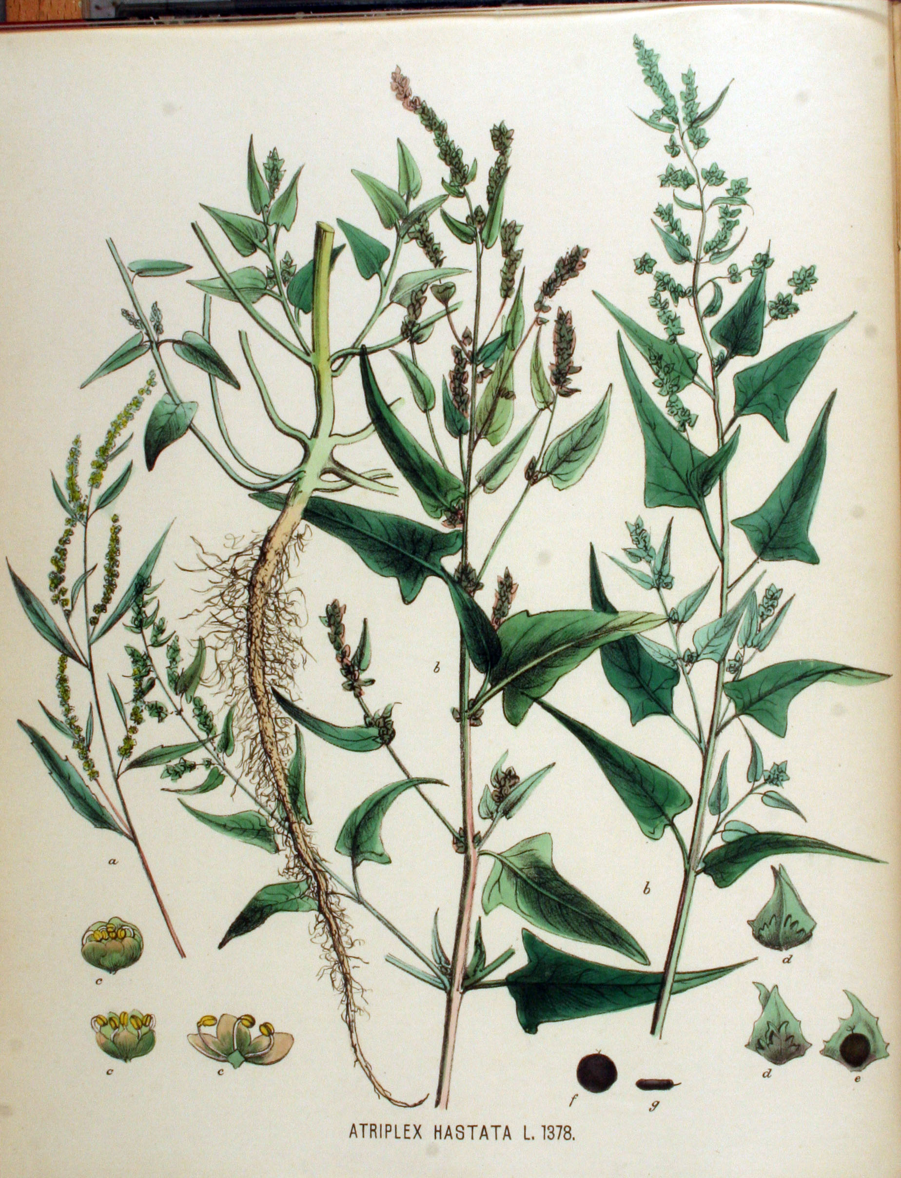 Atriplex prostrata Boucher ex DC. (Syn. Atriplex hastata auct non L.)